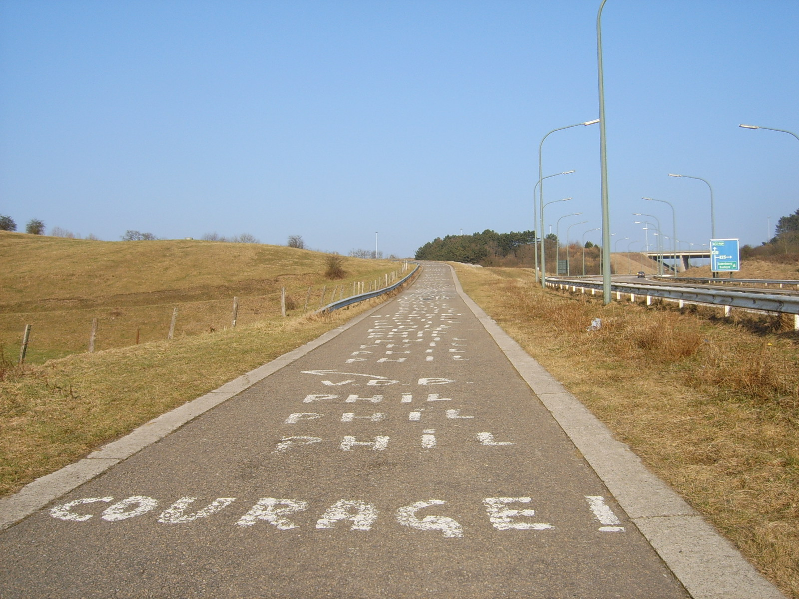 Côte de La Redoute (Liège-Bastogne-Liège) à Aywaille. Peinture pour le local de l'étape, Philippe Gilbert. Personal picture, I set it in public domain